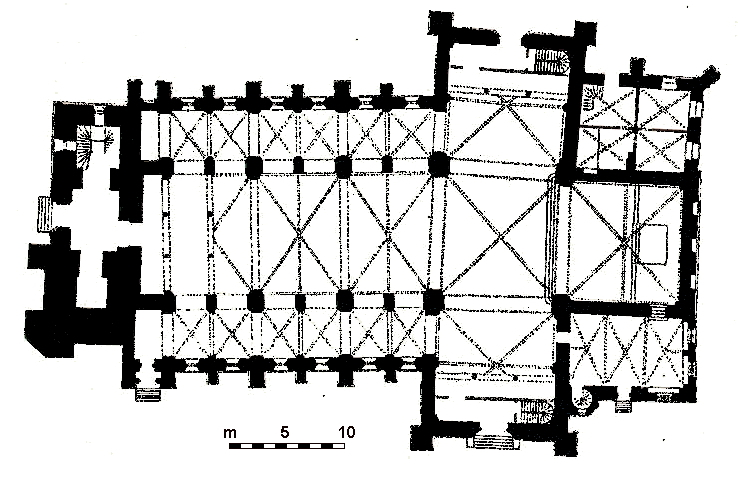 Grundriss der Stephanikirche in Bremen nach dem in den 1888 bis 1891 erfolgten Umbau zur neo-romanisch-frühgotischen Basilika